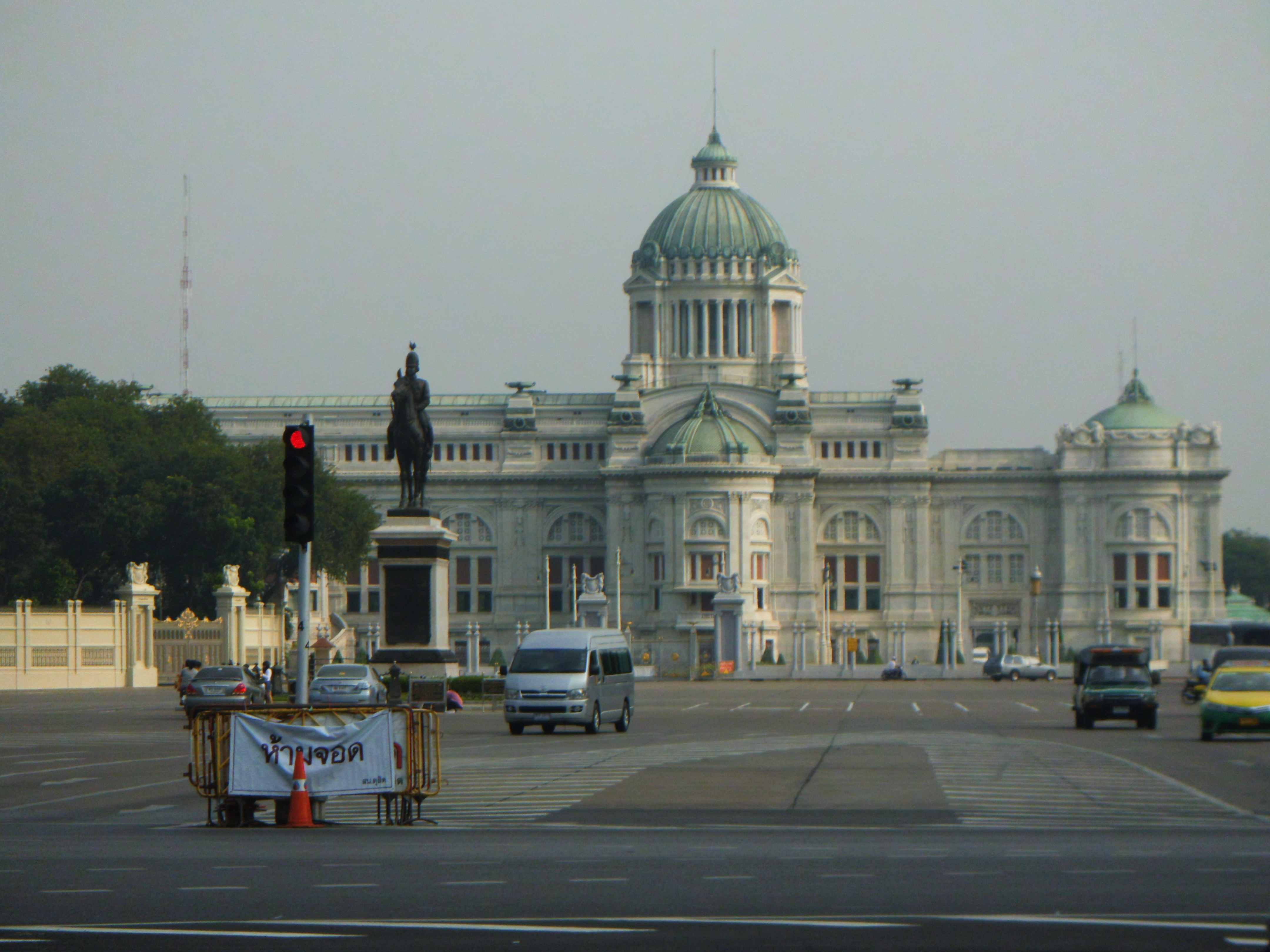 พระที่นั่งอนันตสมาคม